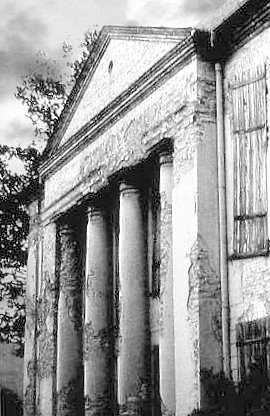 Synagoga w Kępnie